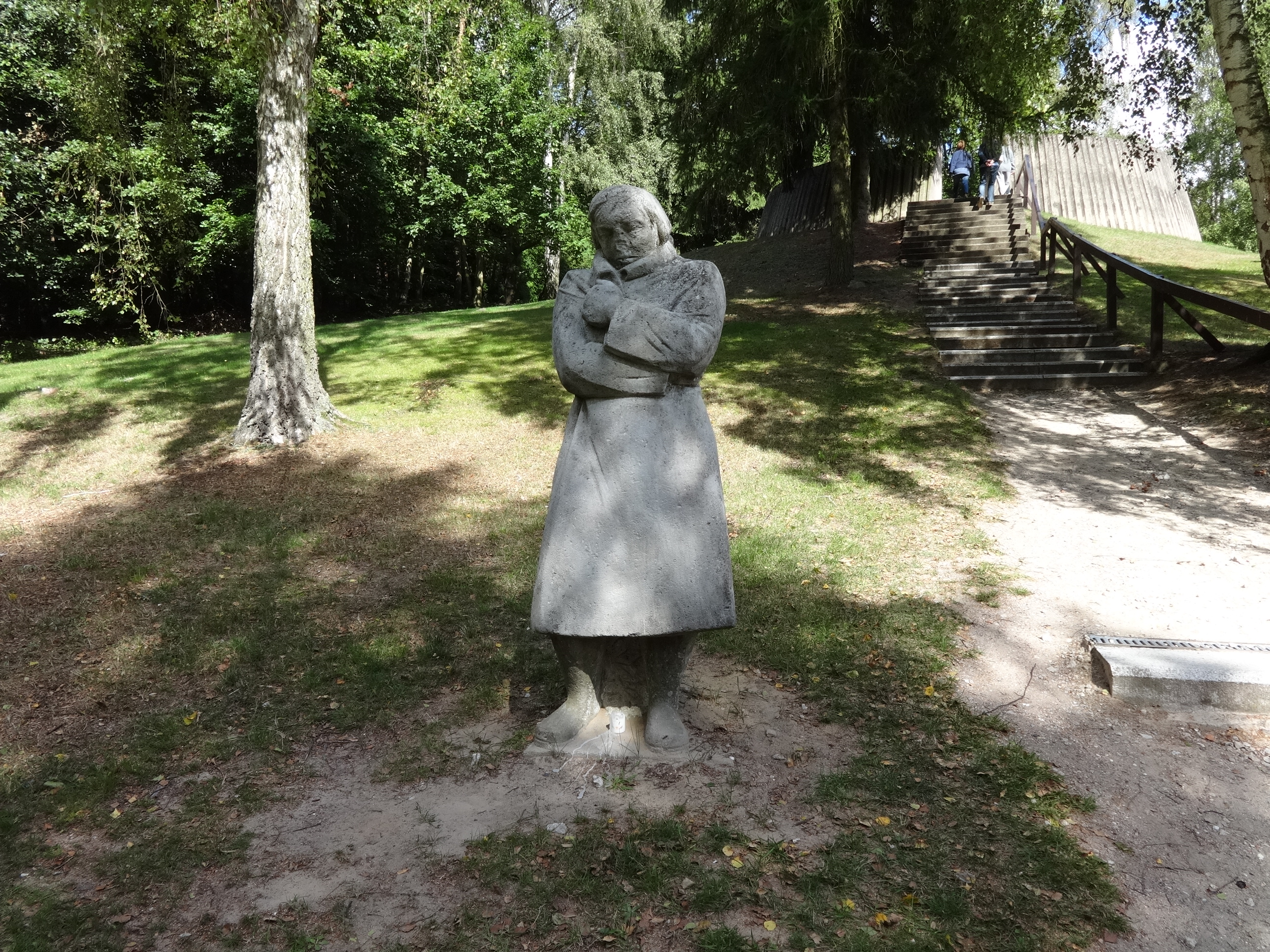 Golm auf Usedom, höchste Erhebung auf der Insel sowie größte Kriegsgräberstätte in Mecklenburg-Vorpommern